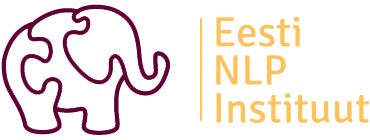 Eesti NLP Instituudi logo